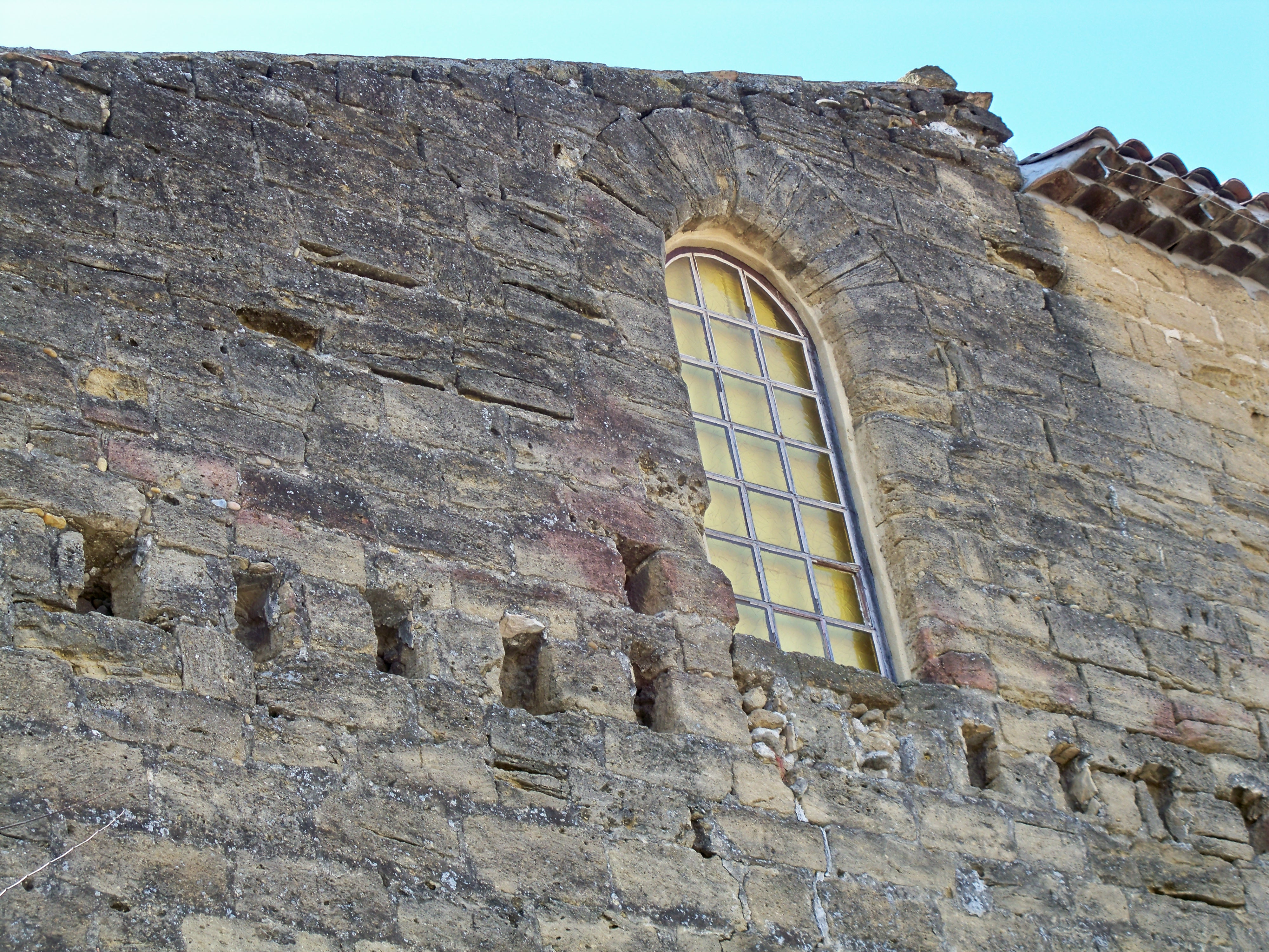 Palais des Papes de Sorgues - détail d'une fenêtre arrière